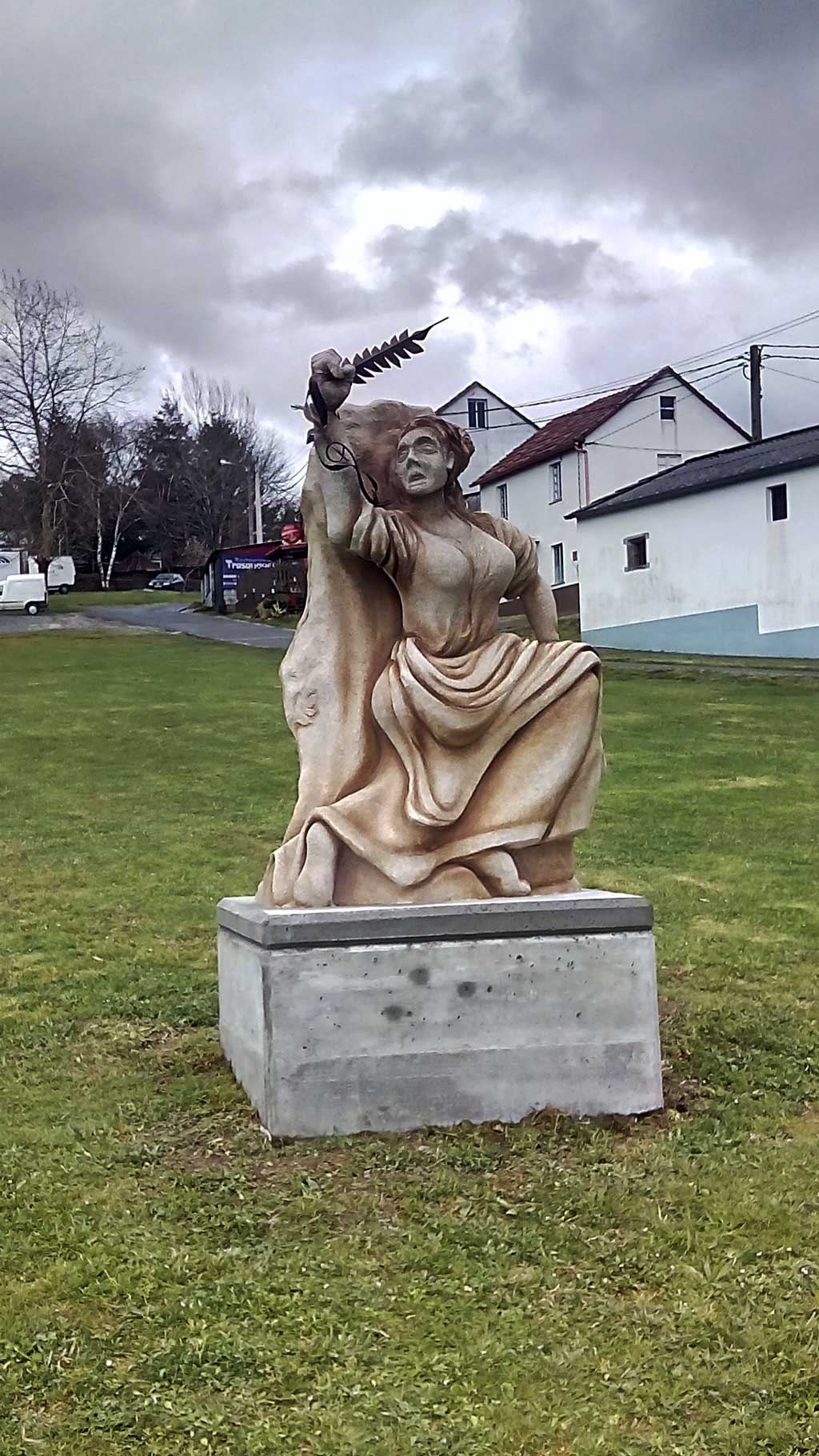 Monumento ás vítimas da Revolta das Pedradas, Sedes, Narón.